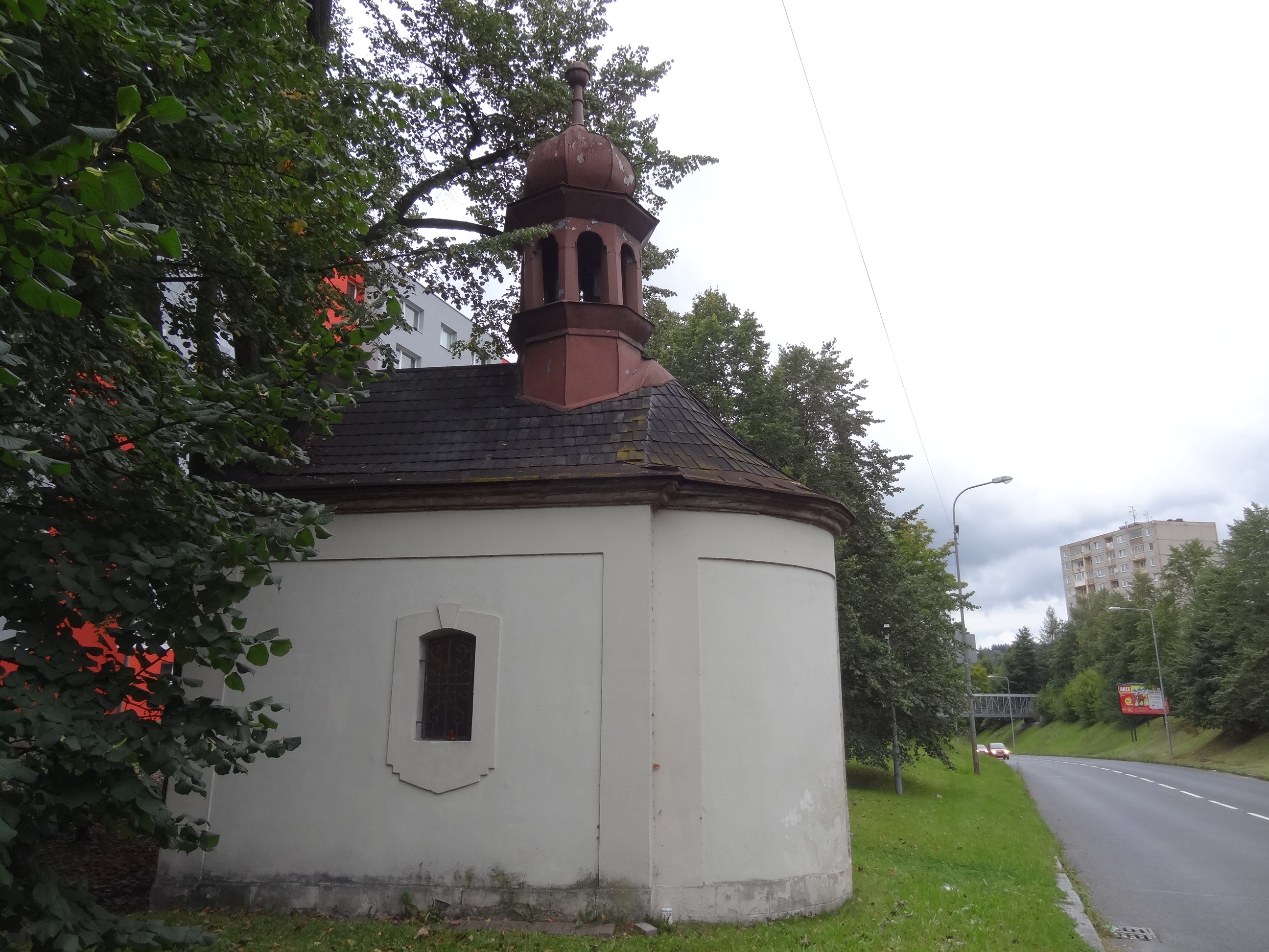 Barokní kaple svaté Anny vystavěná pravděpodobně mezi lety 1780-1782, Mšeno nad Nisou.